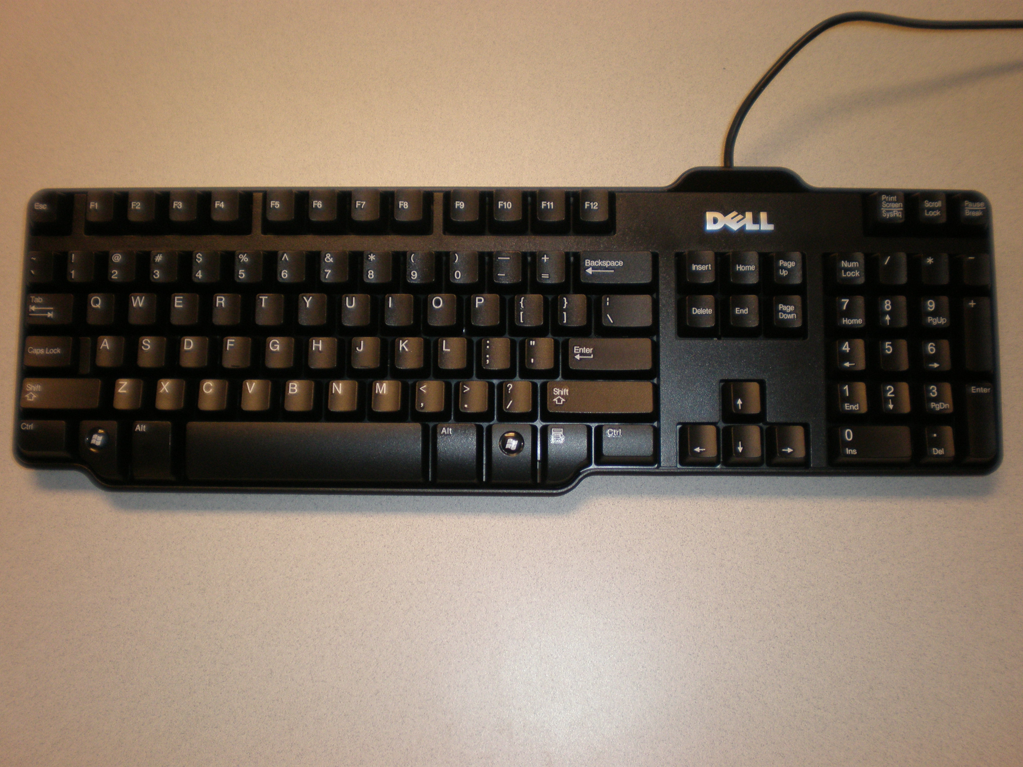 A Dell L100 keyboard